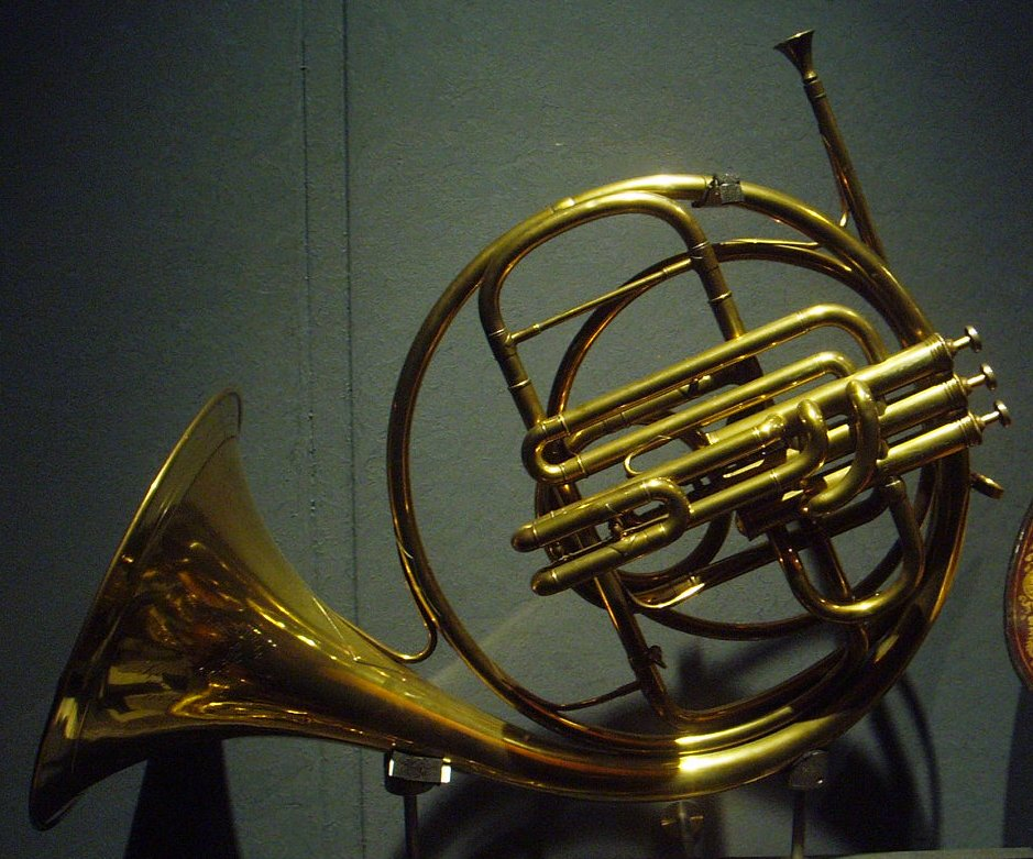 Cor à piston compensateur - Jean Baptiste Arban, Paris, late XIXth century - Paris, musée de la musique